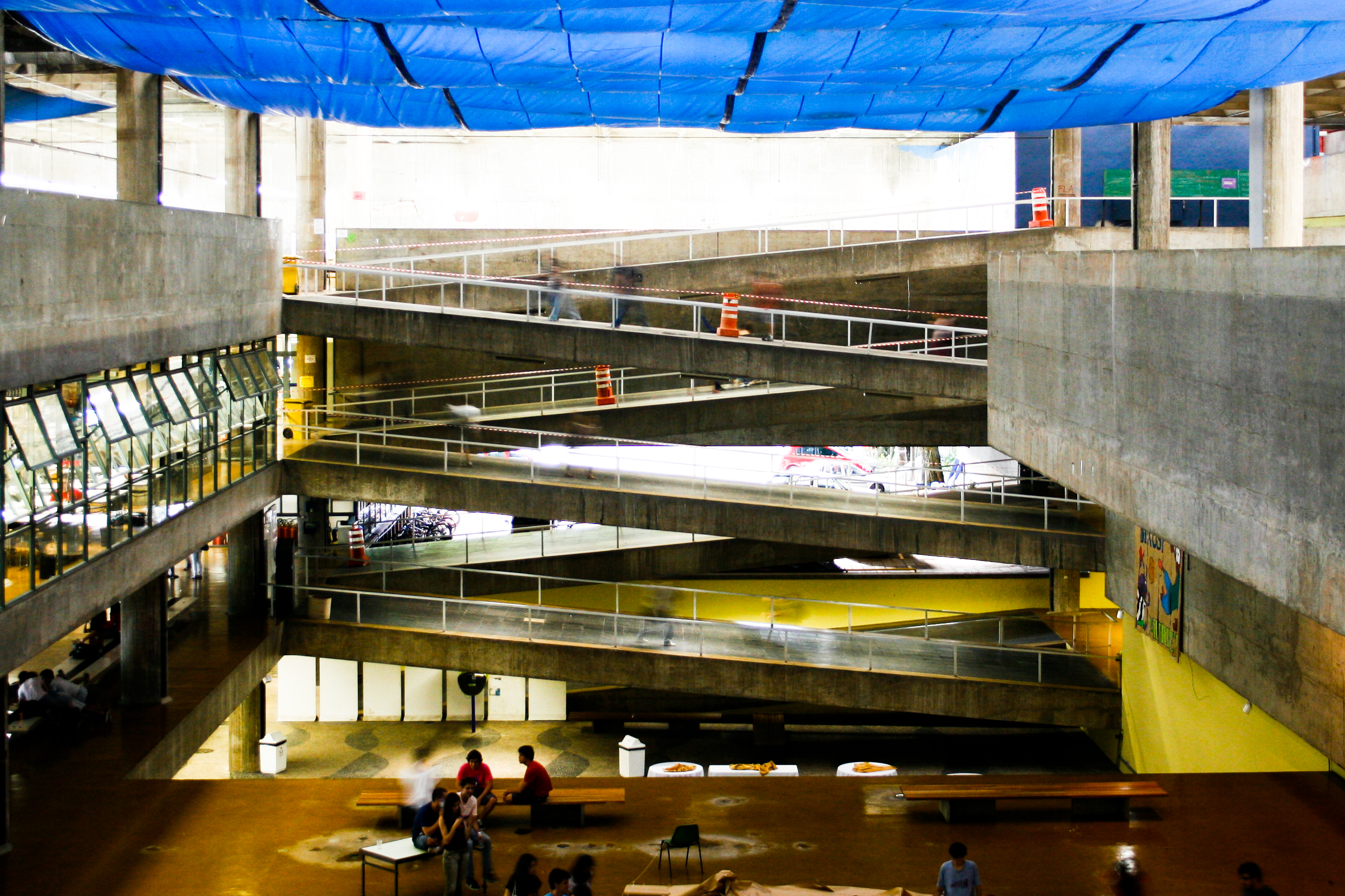 Rua do Lago, 876, Cidade Universitária. Foto por Felipe Lavignatti para o Arte Fora do Museu (